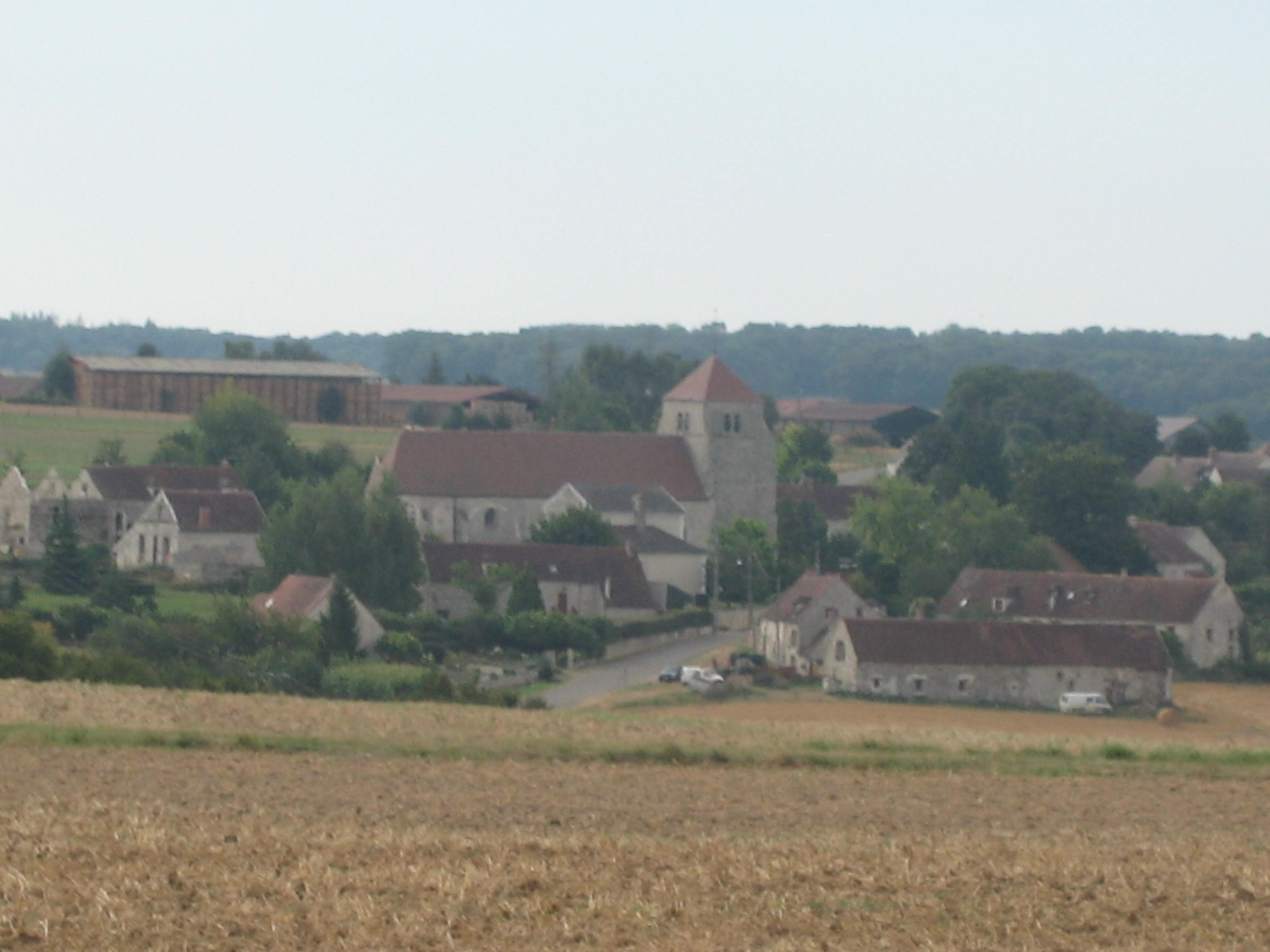 Le village de Vendières 02540